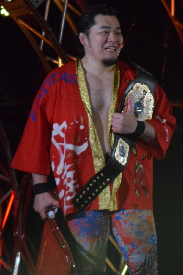 2016年2月11日 大阪府立体育会館 「THE NEW BEGINNING in OSAKA」 矢野通